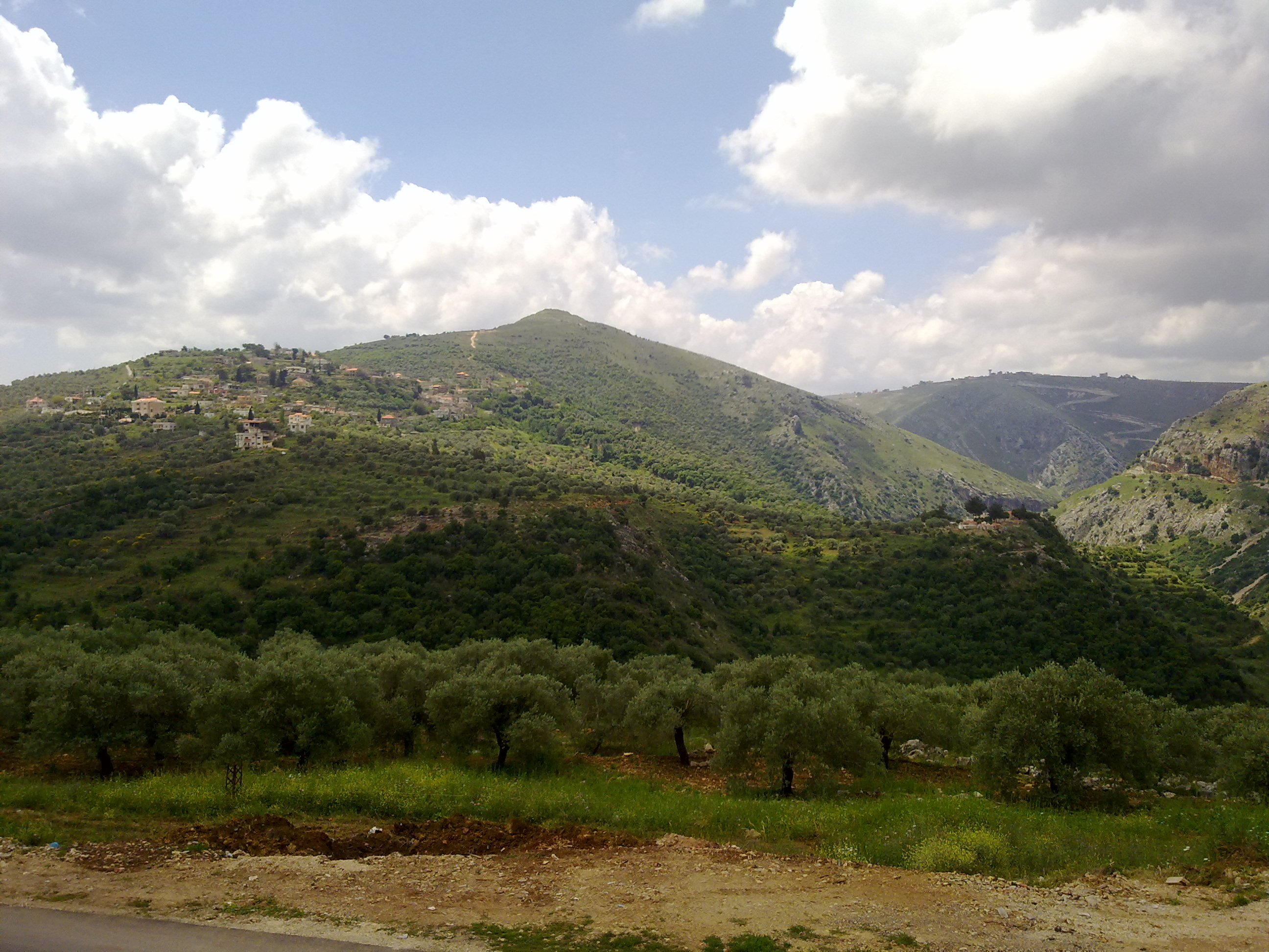 Qlayaa, Lebanon